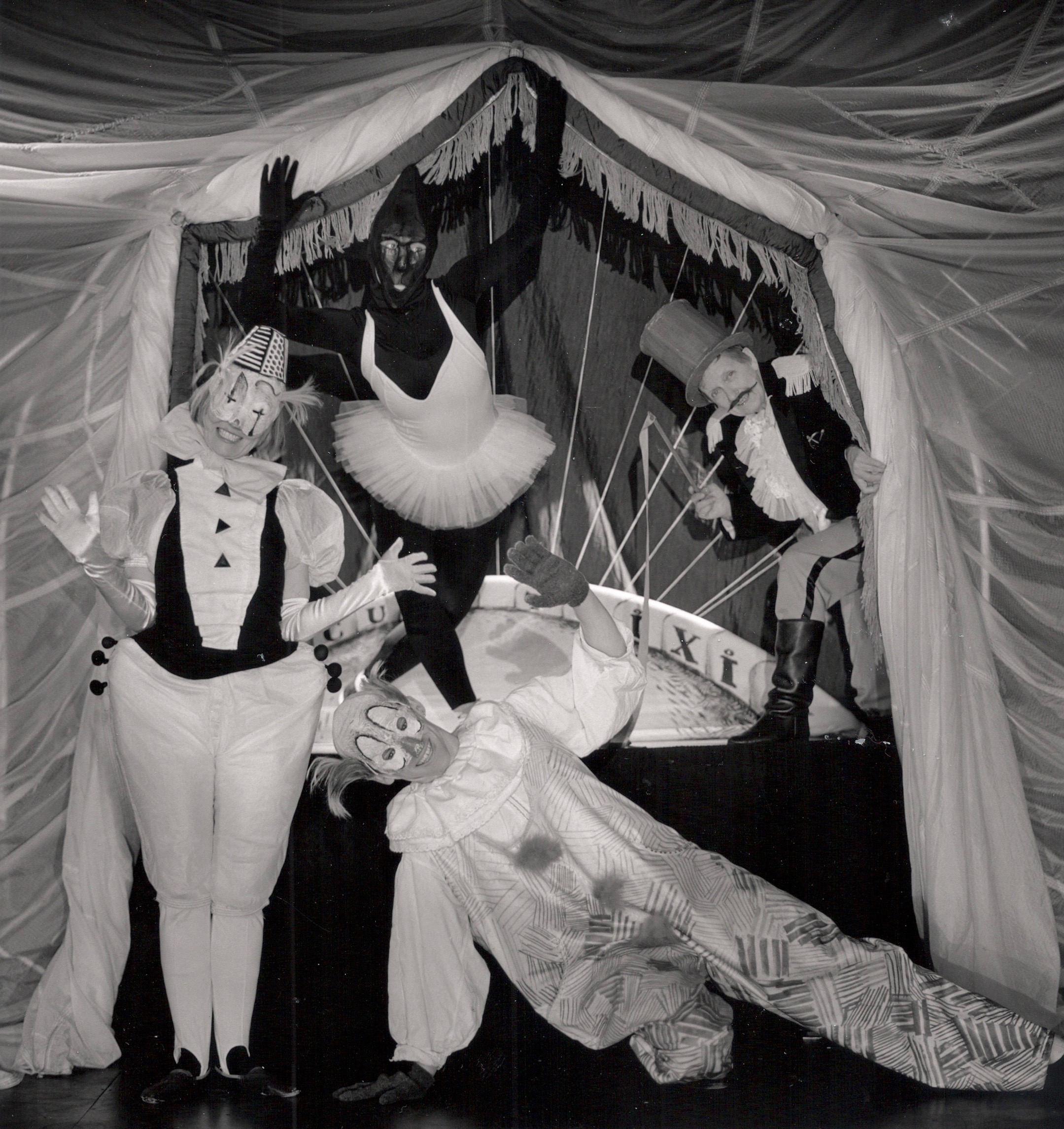 Tromsø Dukketeater profesjonelle del 1992 "Polarsirkus" Foto Helge Matland